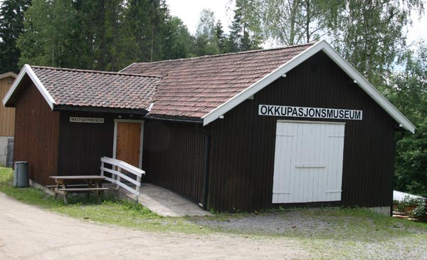 Eidsvoll okkupasjonsmuseum